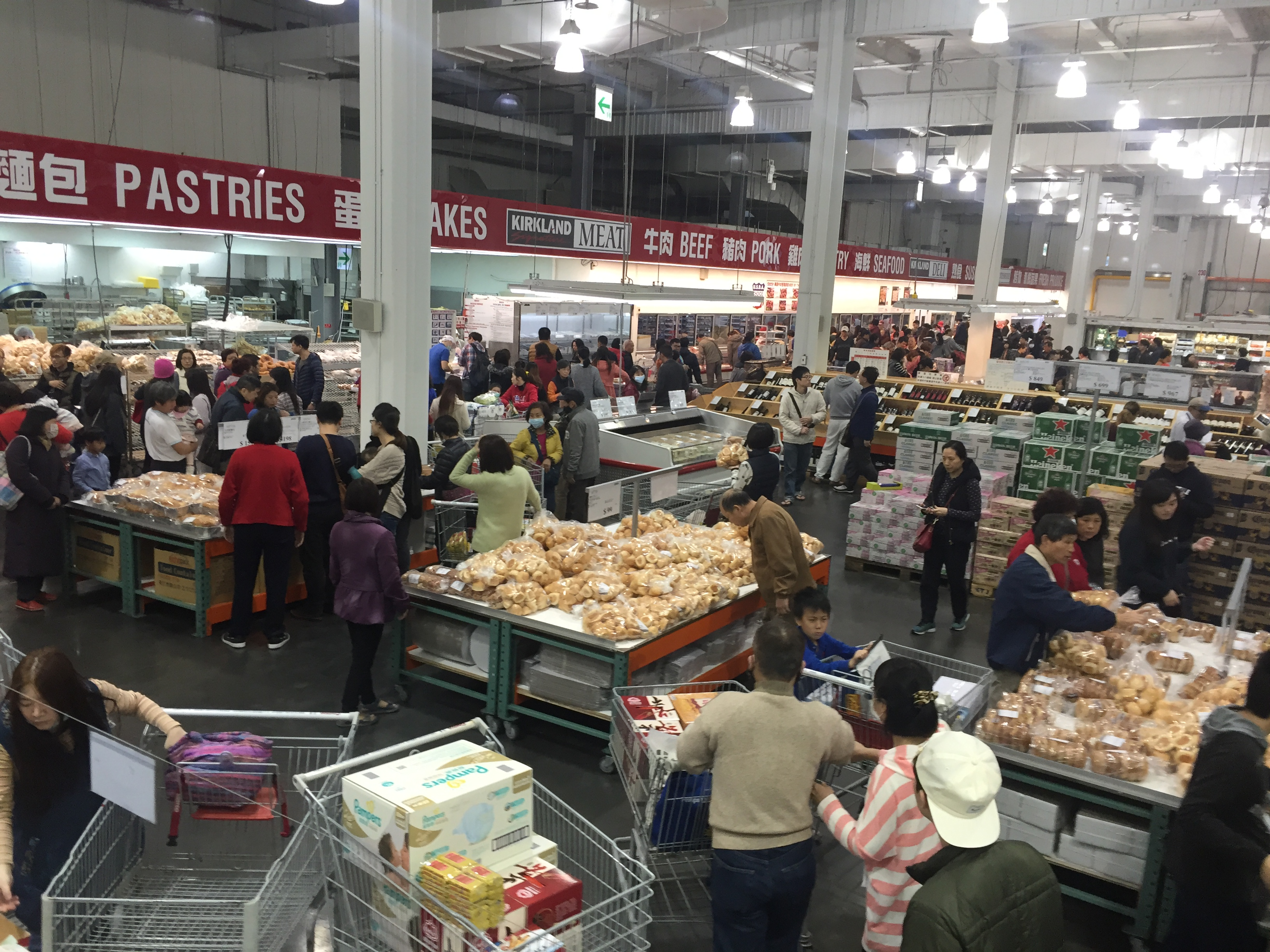 從好市多內湖店二樓往一樓的電扶梯俯望一樓食品區。